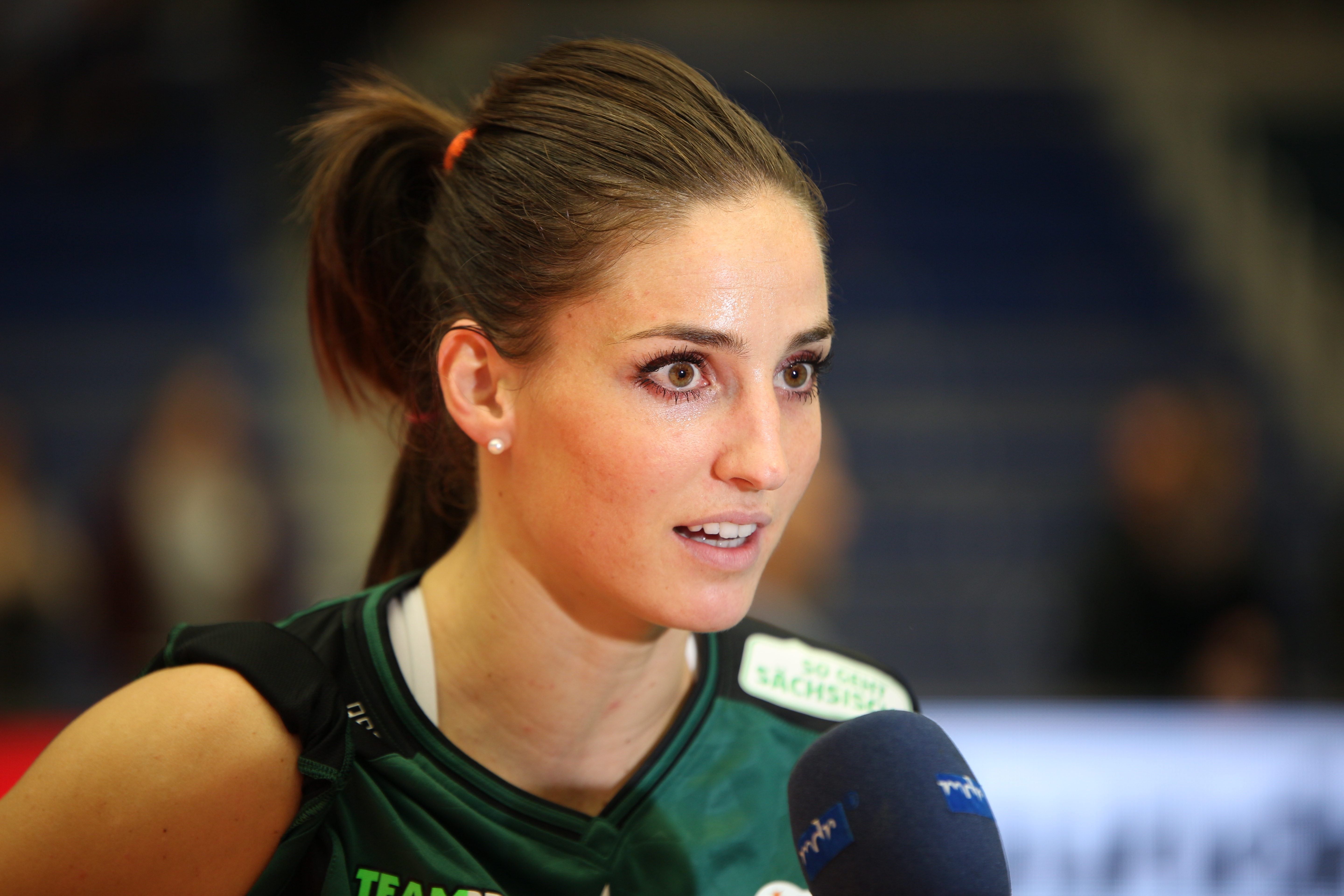 Myrthe Schoot, Dresdner SC